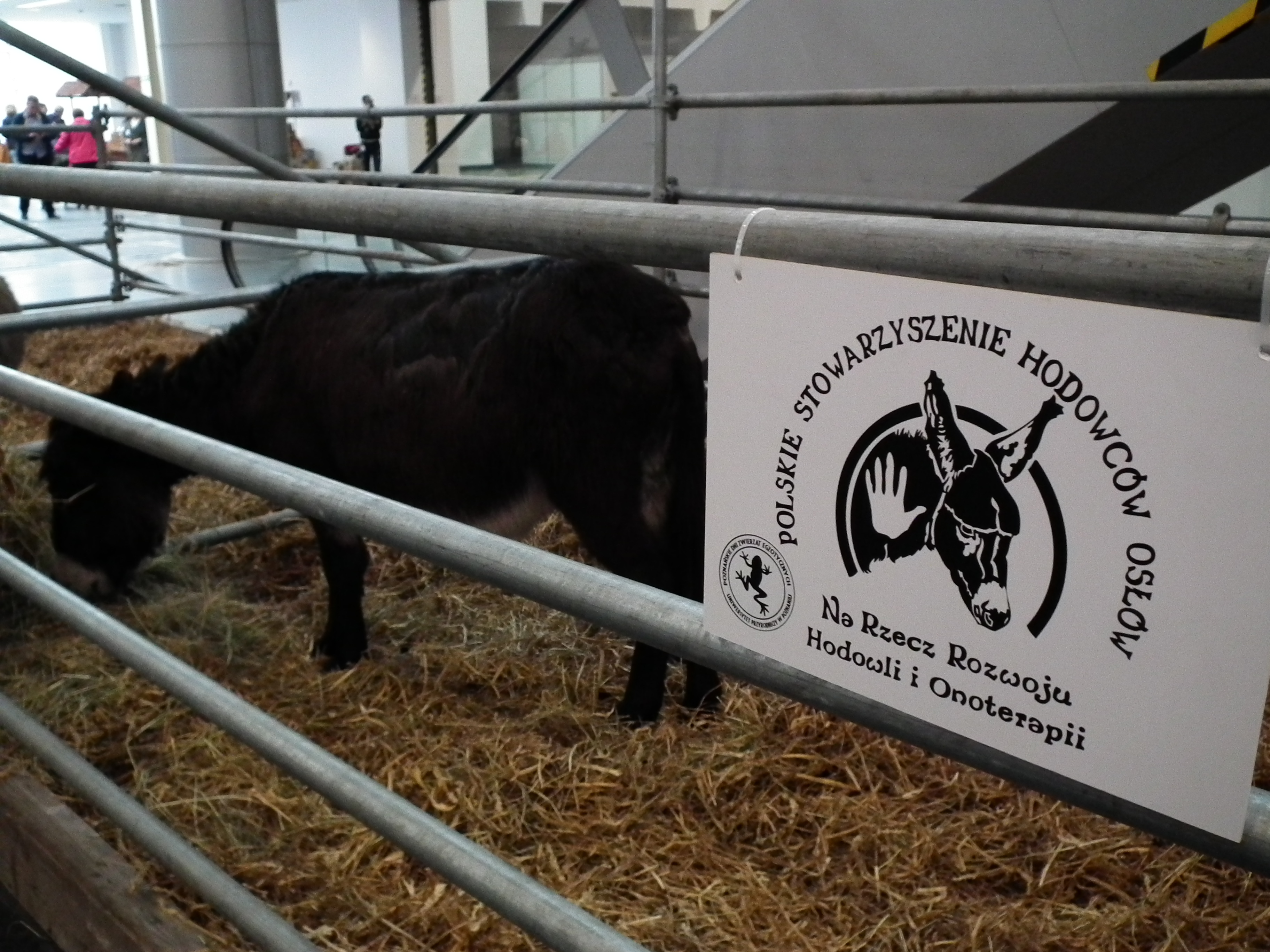 Polskie Stowarzyszenie Hodowców Osłów - logo.